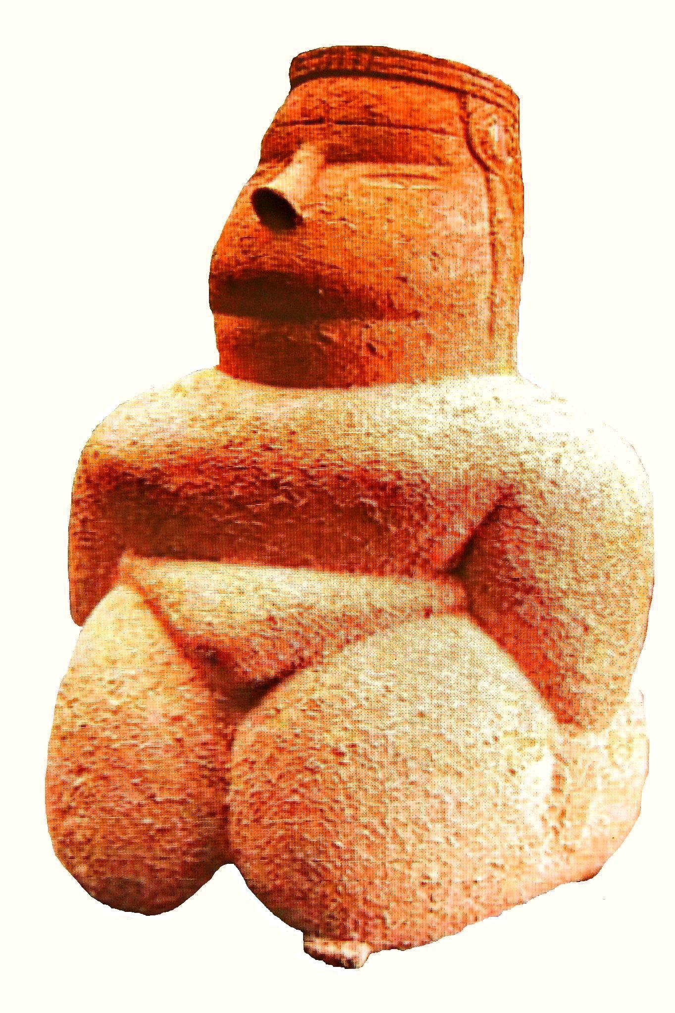 Museo Archeologico Nazionale di Cagliari(Sardegna)Cucurru Arrius - Statuina femminile di dea madre di stile volumetrico appartenente alla "Cultura prenuragica di Bonu Ighinu" precedente alla Cultura di Ozieri.